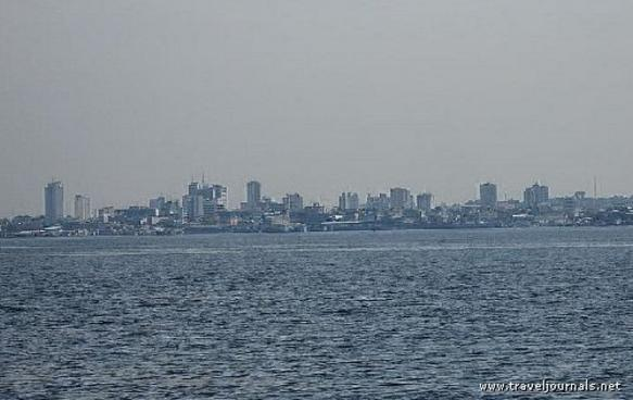 Vista do horizonte de Manaus.